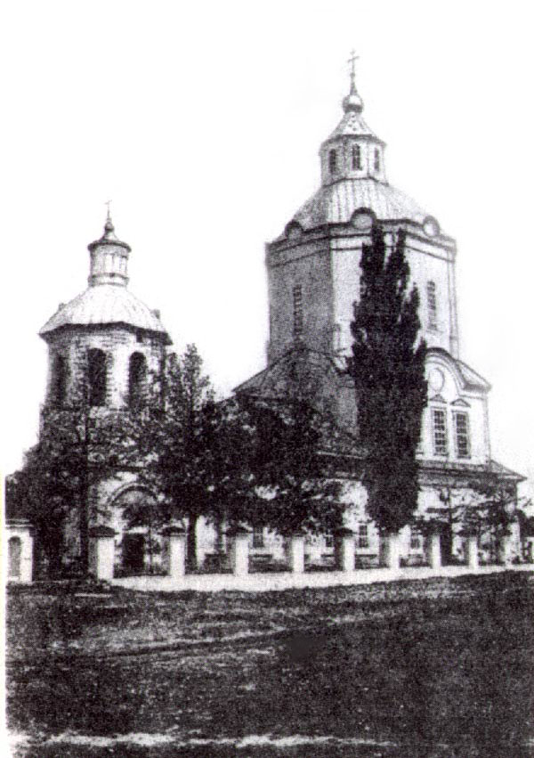 Old photography Ratna Church.